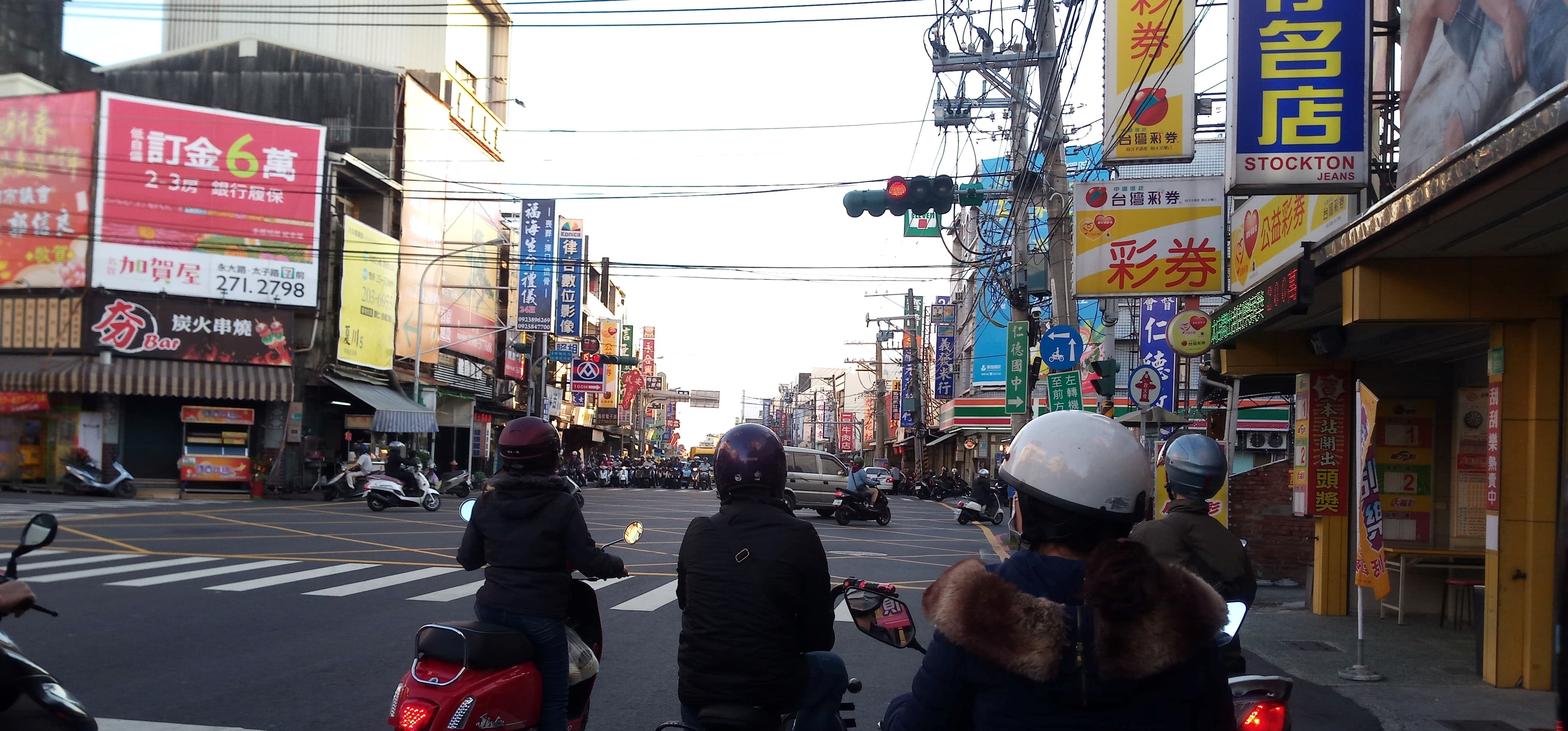 後壁厝市區-仁德教會十字路口